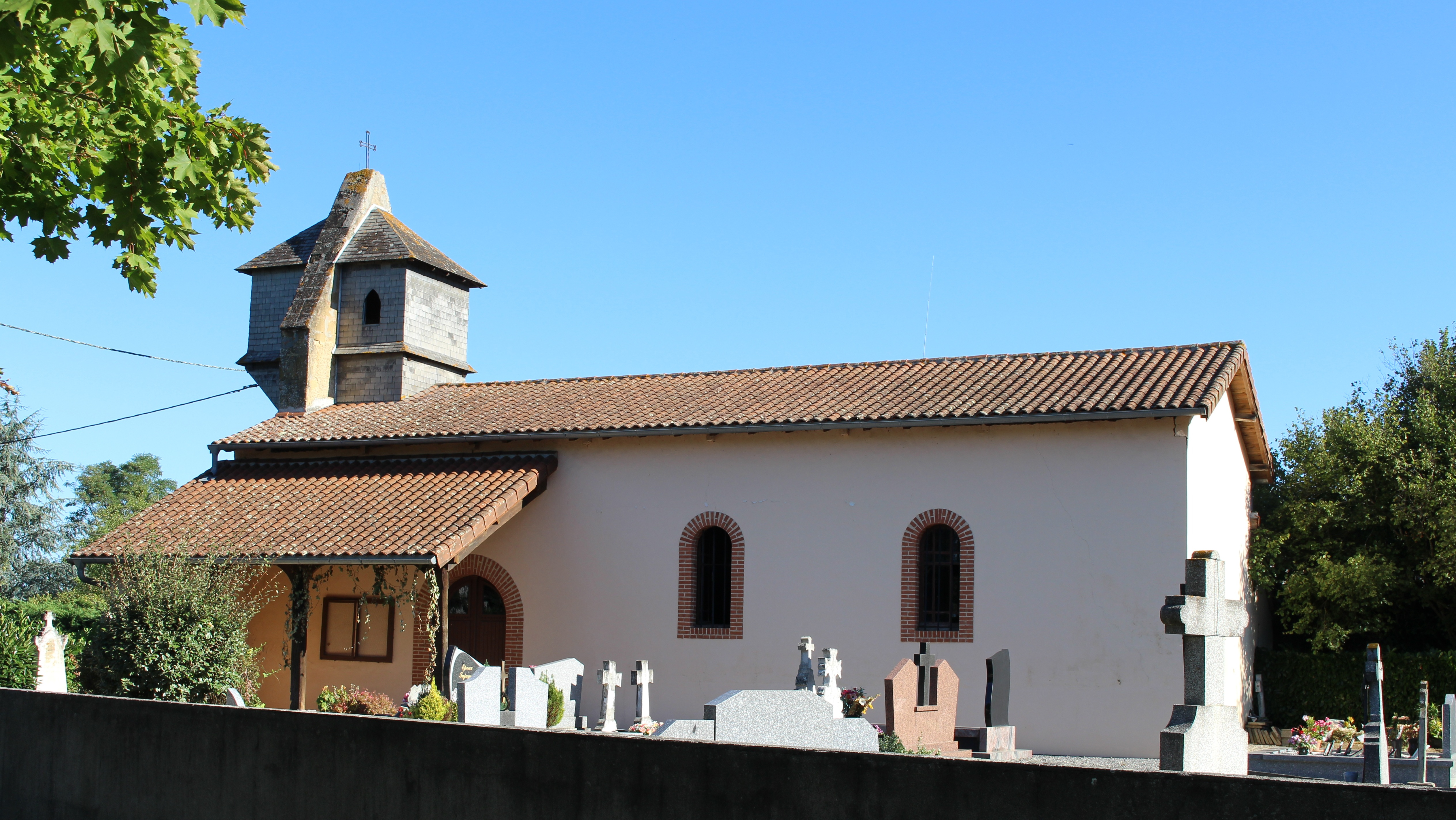 Église Saint-Pierre de Hachan (Hautes-Pyrénées)